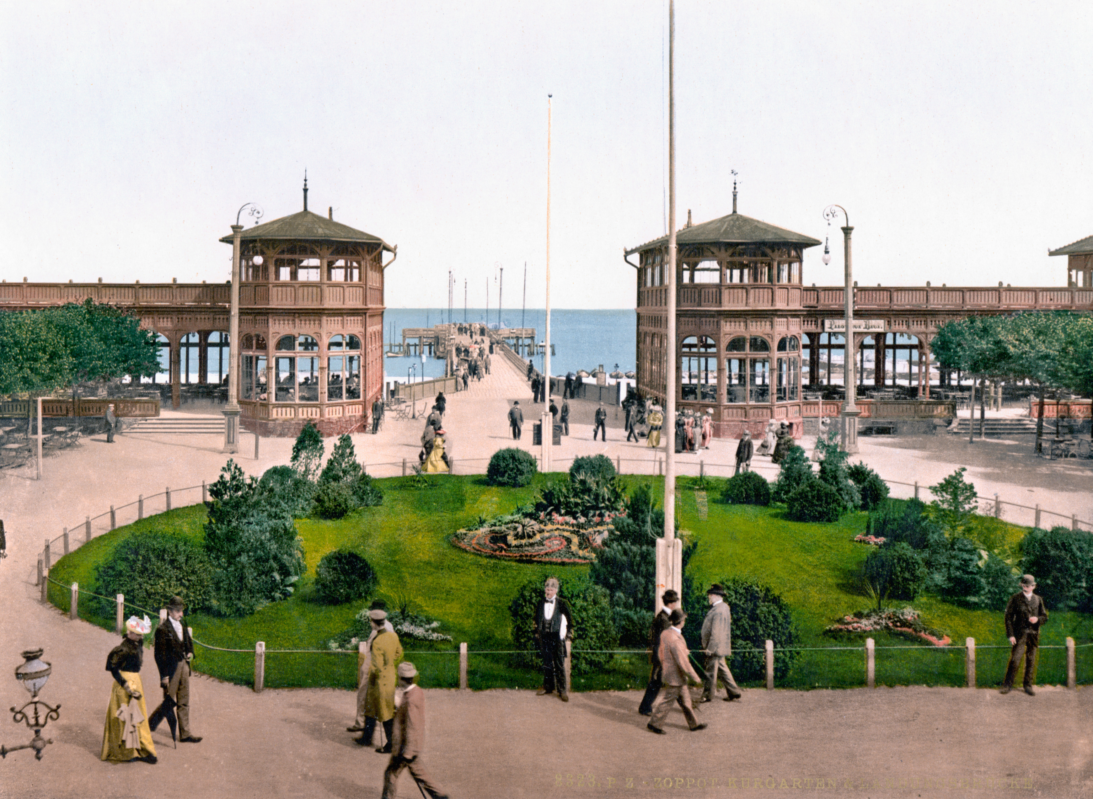 Zoppot Kurgarten um 1900